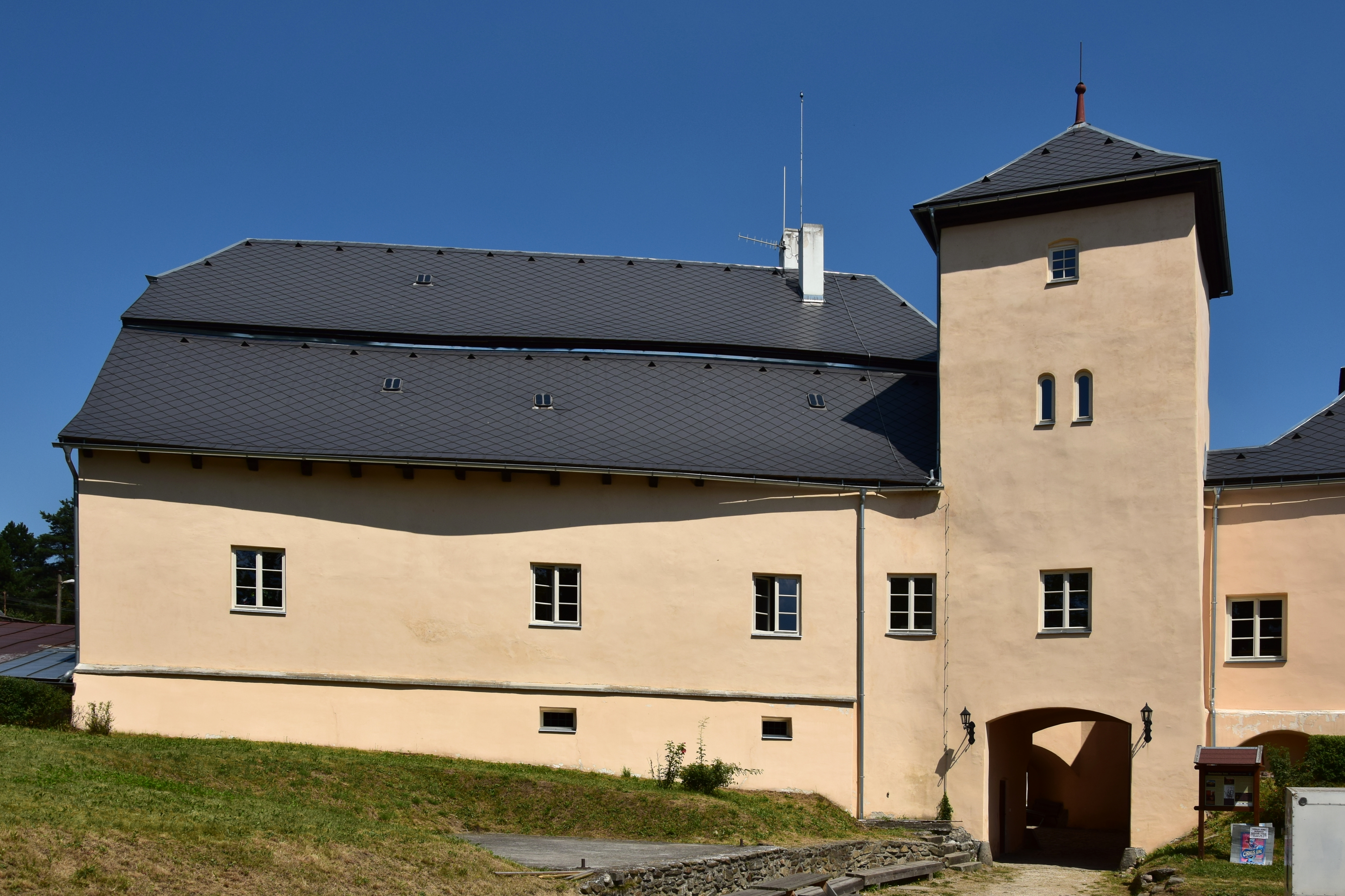 Tvrz, Dešenice 1, Dešenice.